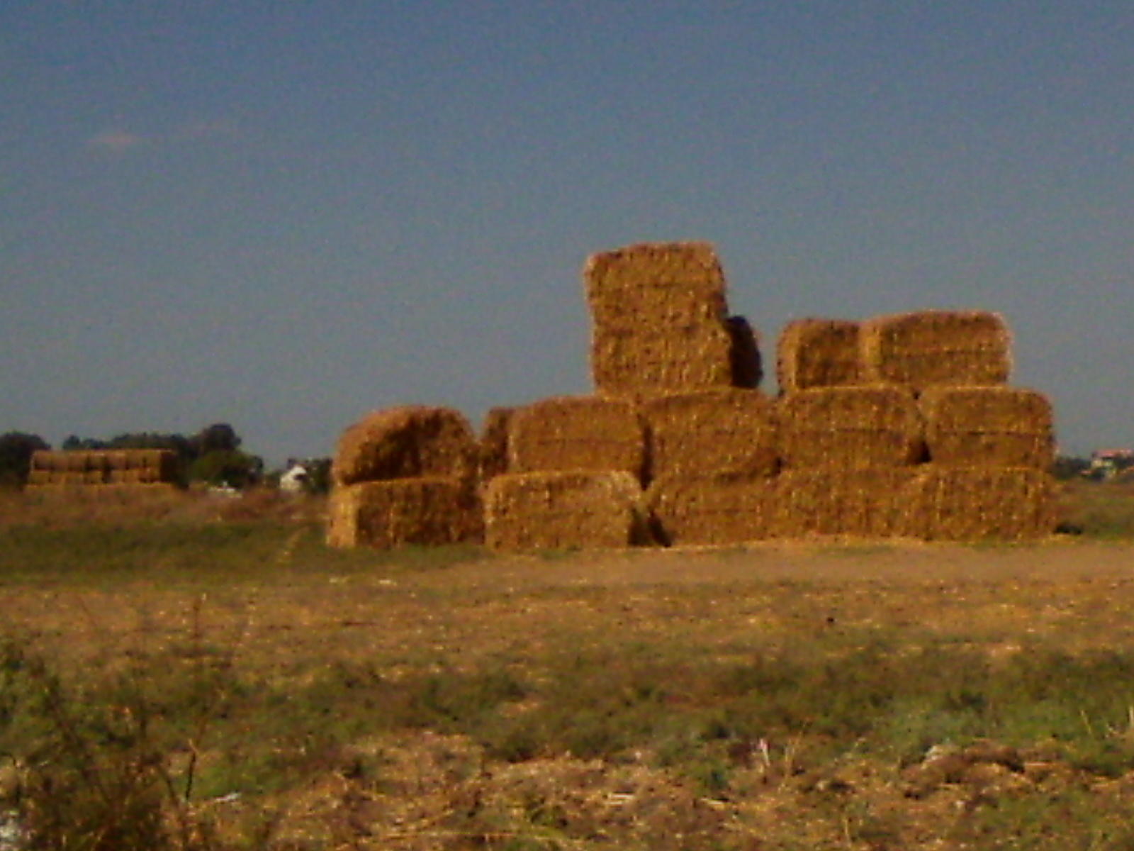 חציר בערימת באלות ישראל